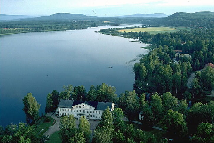 Flygbild över Rådasjön. Uddeholms herrgård i förgrunden. Bilden troligen från mitten av 1980-talet. Motiv: Uddeholm Nyckelord: Byggnadsminnen, Flygbilder, Riksintressen Kategori: Herrgårds-/slottslandskap, Insjömiljöer Flygbild över Rådasjön. Uddeholms herrgård i förgrunden. Bilden troligen från mitten av 1980-talet.